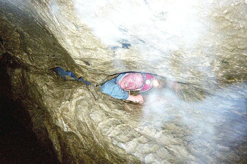 Hölloch-Expedition im Winter 2003